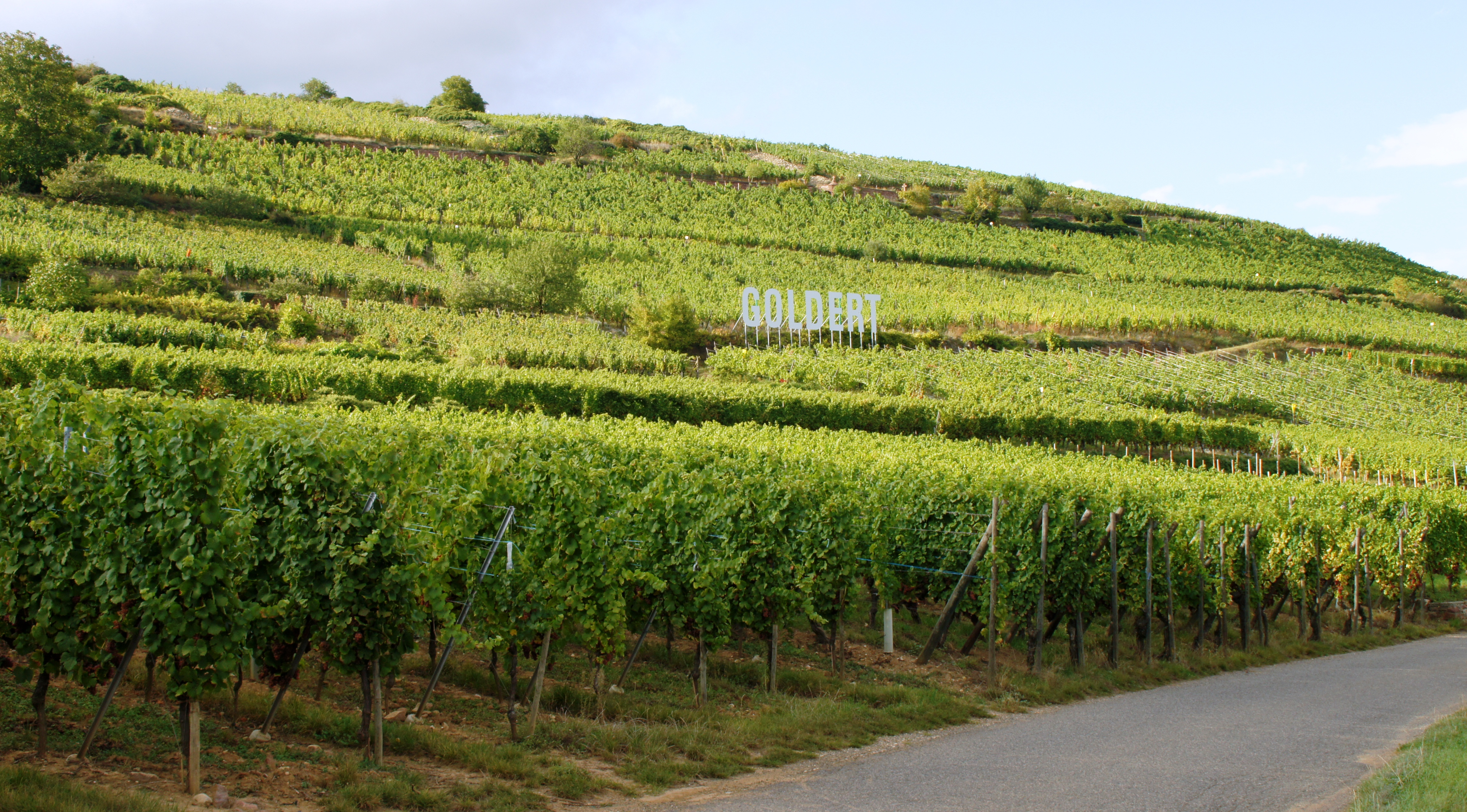 Vignoble grand cru Goldert à Gueberschwirh (Haut-Rhin)